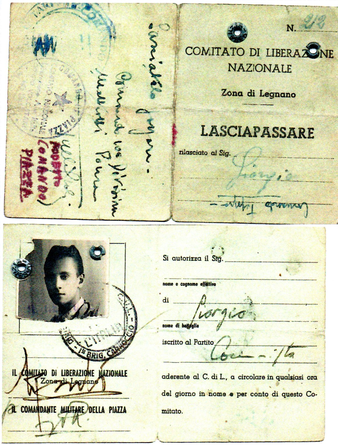 lasciapassare del CNL